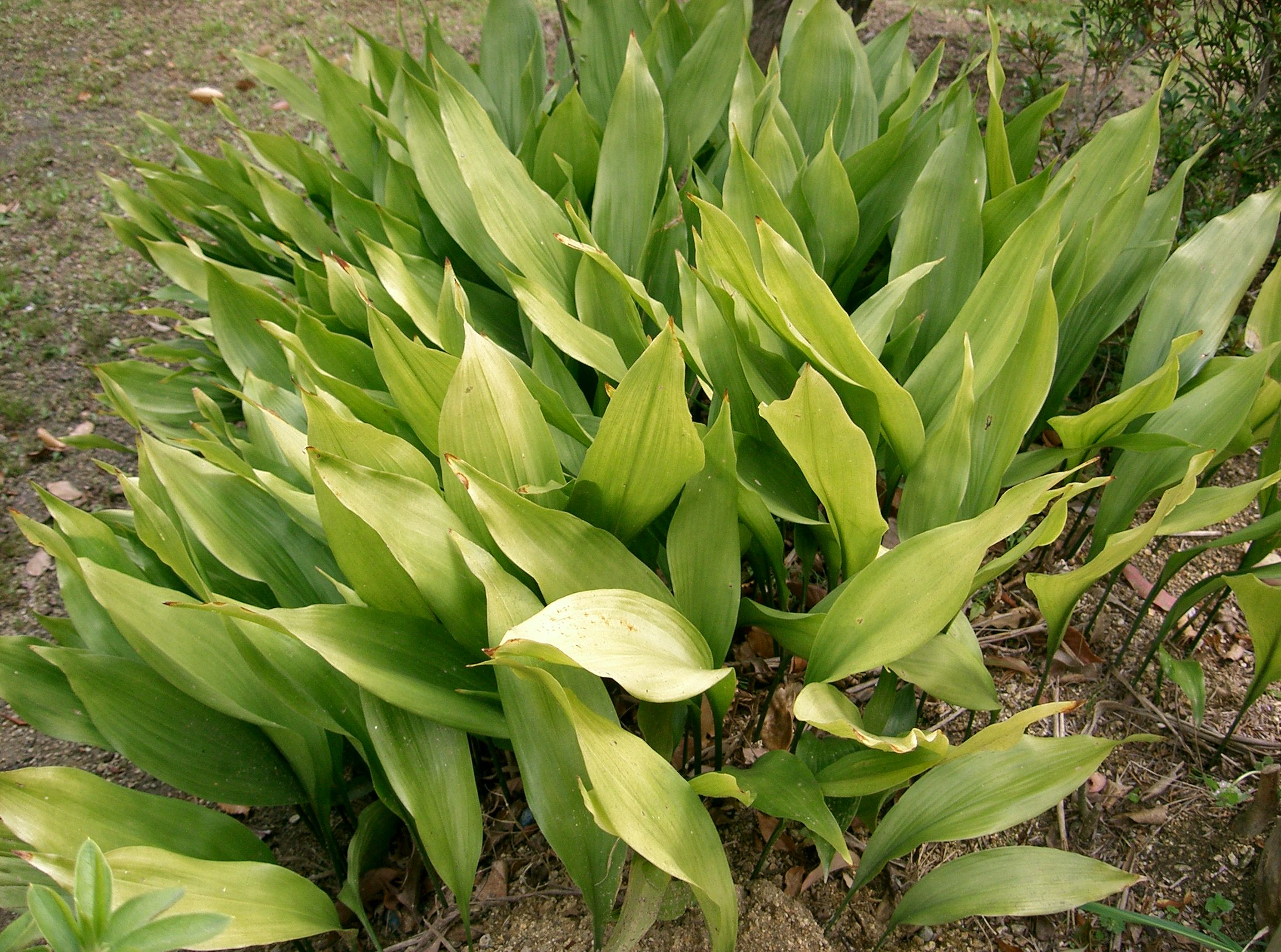 Scientific name: Aspidistra elatior